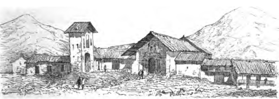 Campanario e iglesia de Huamacucho